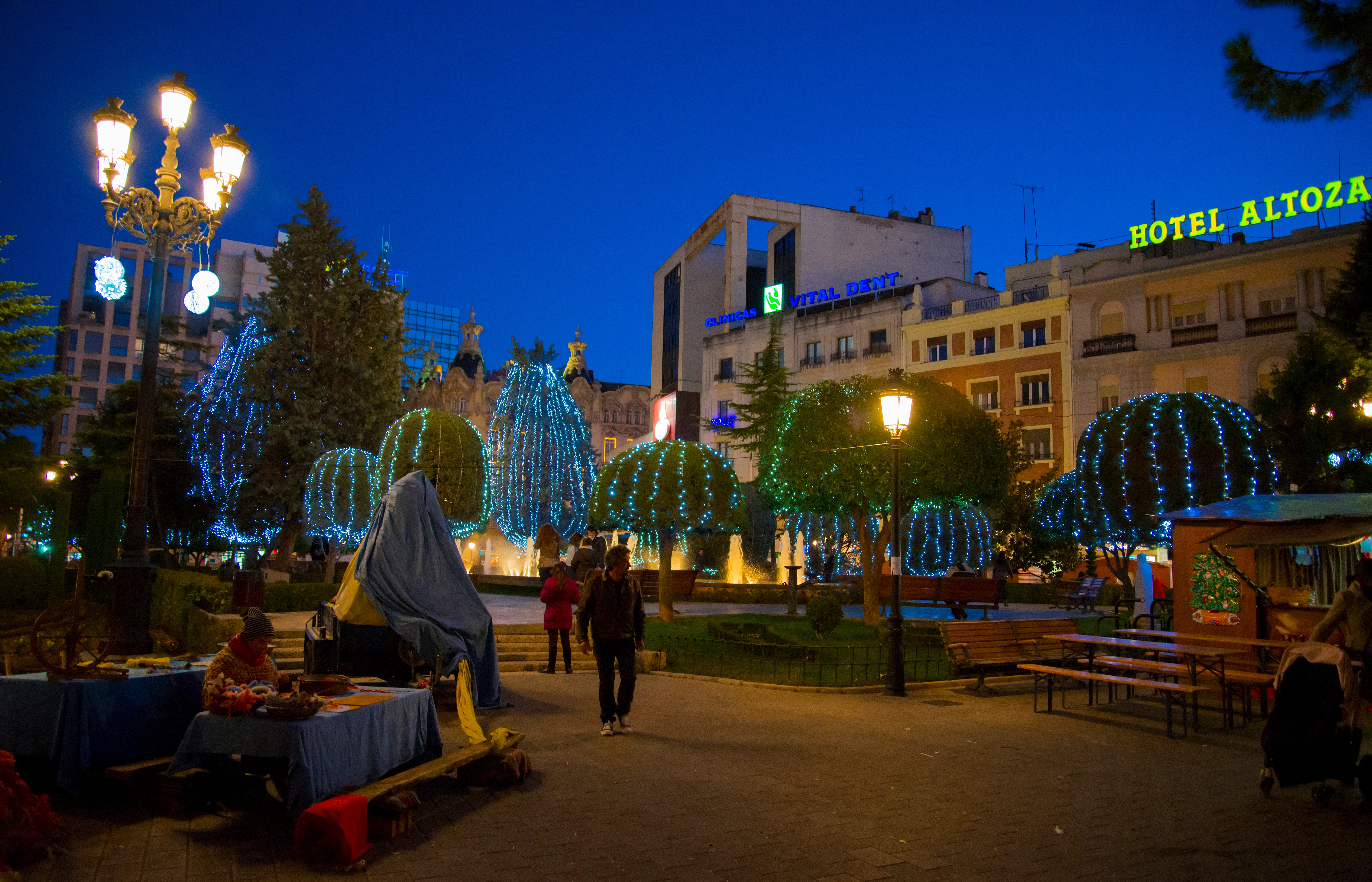 Albacete nocturno